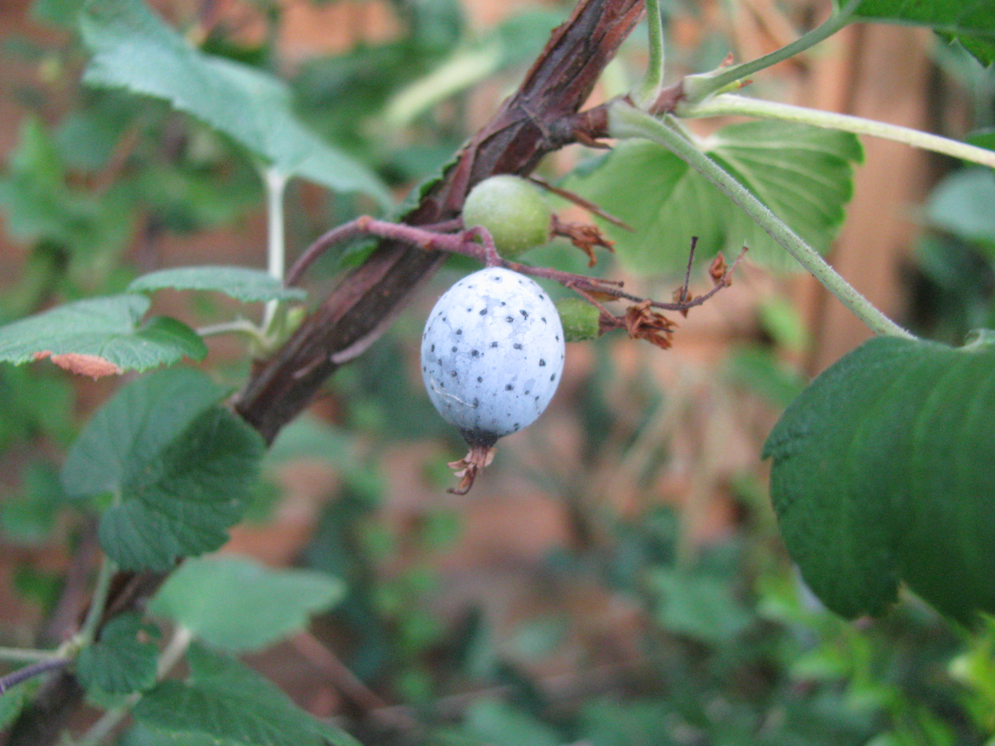 Frucht der Blutjohannisbeere (Ribes sanguineum)